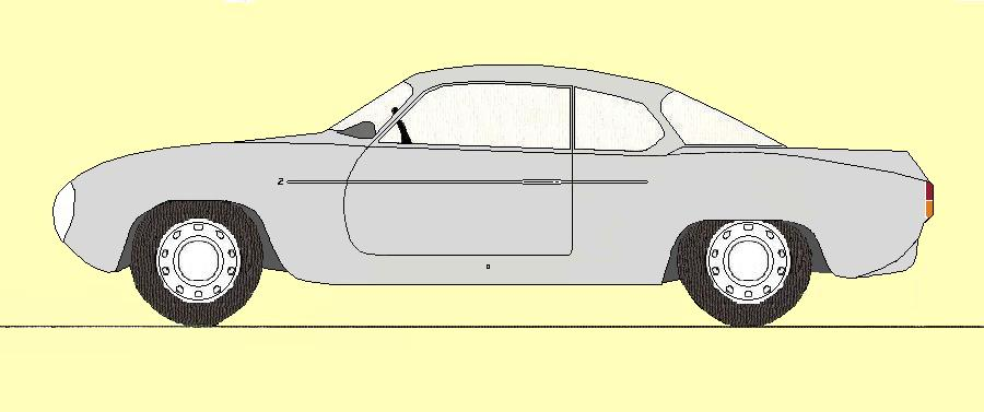 Disegno eseguito dal sottoscritto (Giomayo) con il programma "Paint" di Windows ispirandomi ad immagini diverse riguardanti la Lancia Appia Zagato, pubblicate su riviste degli anni'50 (in particolare "Auto Italiana" n. 8/1957)